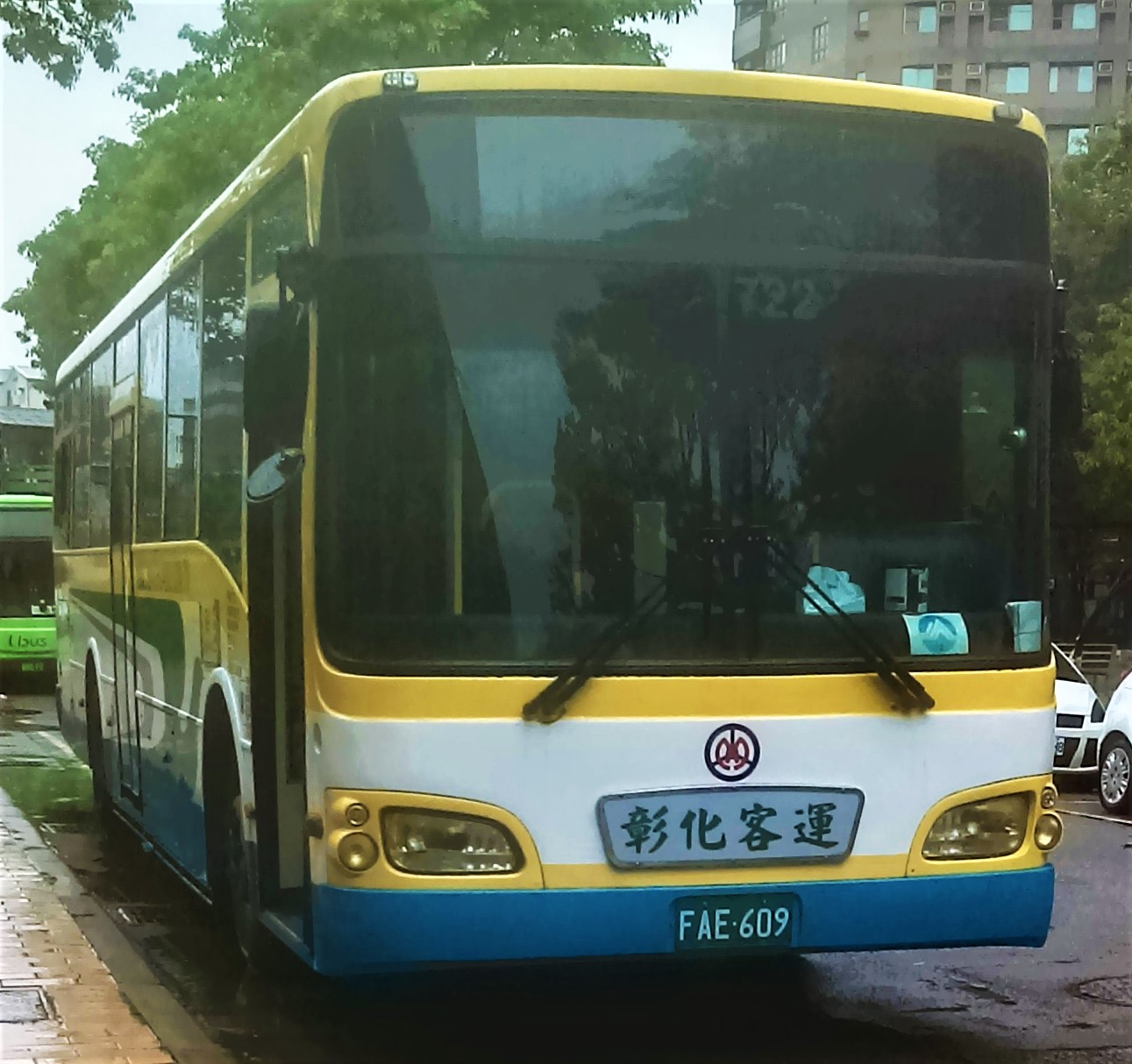 彰化客運日野RK8JRSA大客車FAE-609行駛台中市公車99路 原新店客運車輛